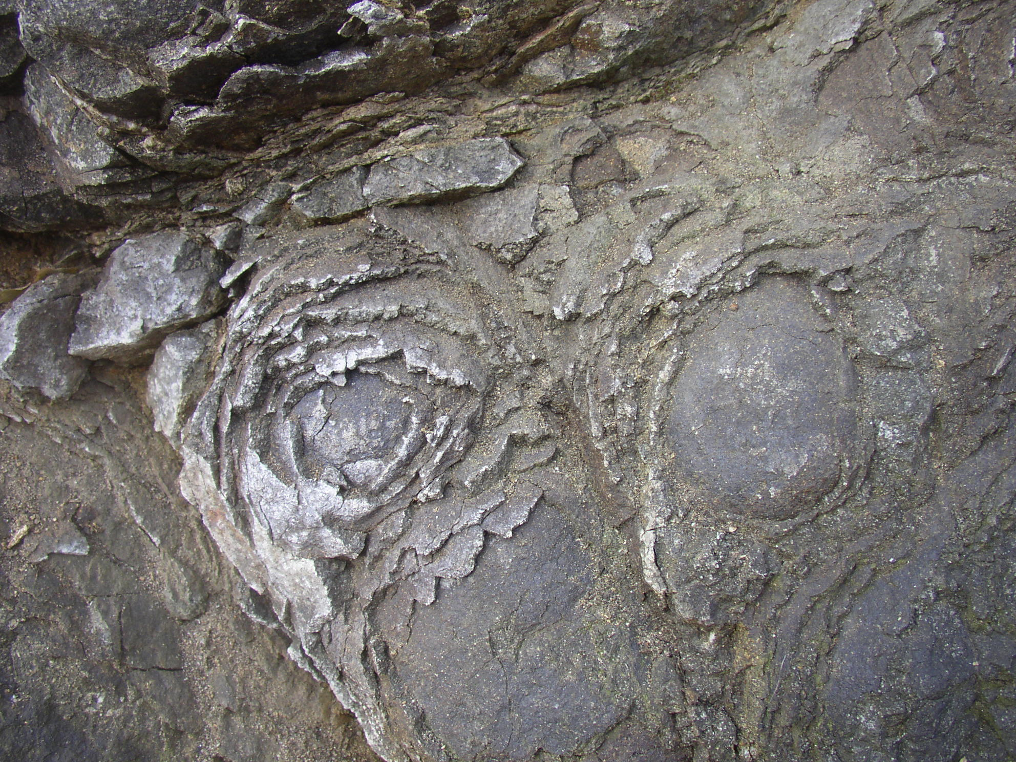 Česky: Tzv. chuchelské růžičky v NPP Barrandovské skály. Kulový rozpad diabasu, vyvřelého v silurském období do usazenin mořského dna. Pro představu o měřítku: velikost jedné "růžičky" je zhruba několik cm. Vyfotografováno pobííž 7. zastavení NS Barrandovské skály-Chuchelský háj. [1]